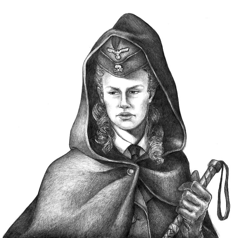 SS-Aufseherin: Female Camp Guards